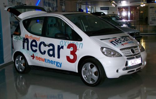 Mercedes Benz Necar-3 Methanol-Brennstoffzellenversuchsfahrzeug. Museum Autovision